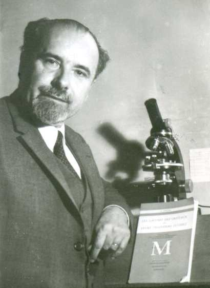 Georges Deicha son livre "Les Lacunes des cristaux" et son Microscope équippé de sa platine à écrsement